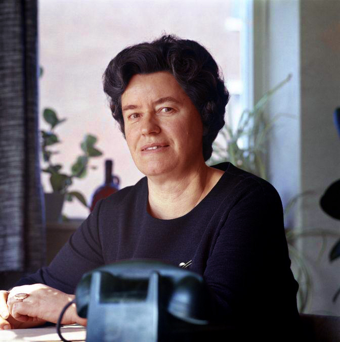 Hannie Singer-Dekker, PvdA politica, 1966.